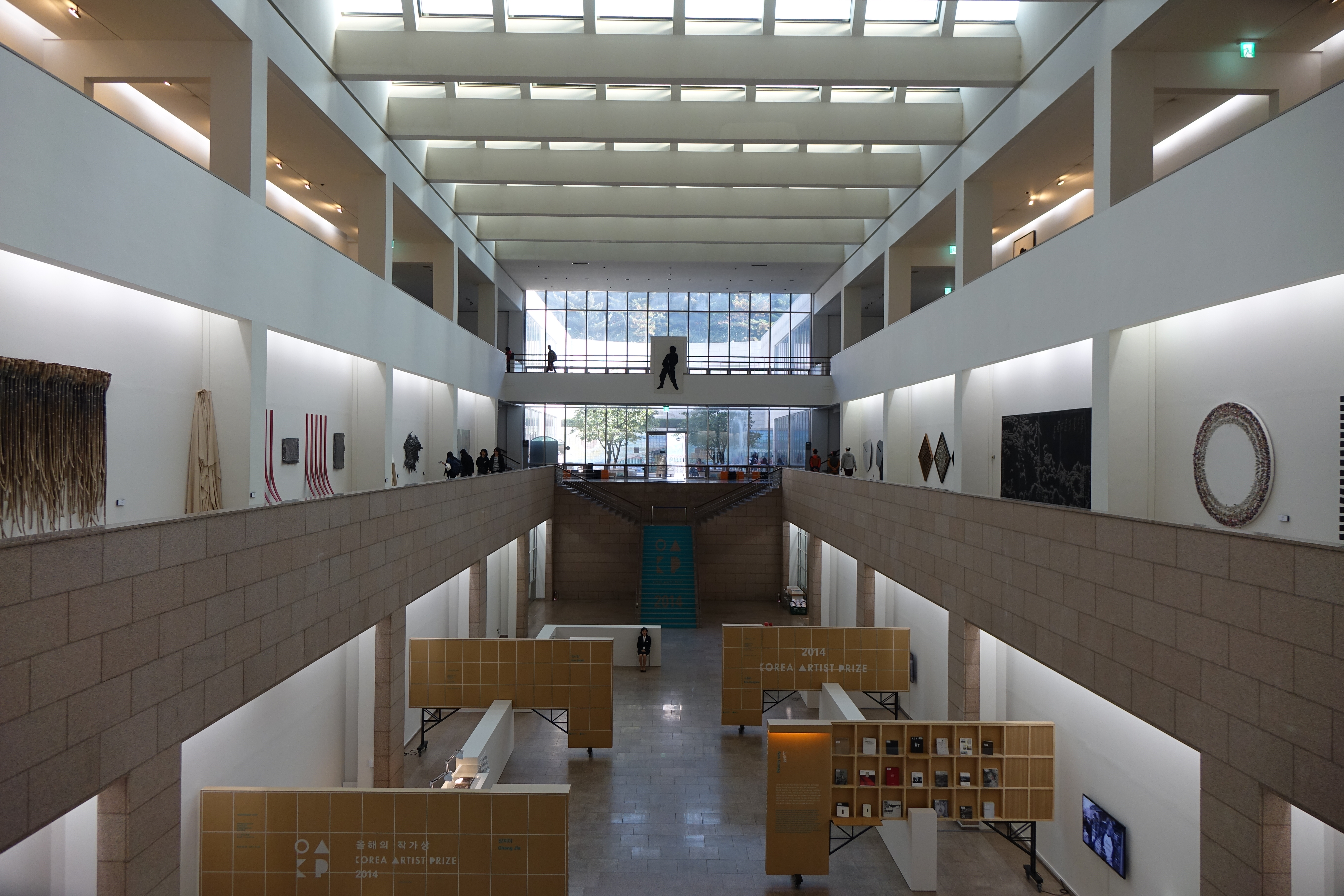 2014년 10월 22일 서초소방서 방배119안전센터 추계 워크샵 현대미술관